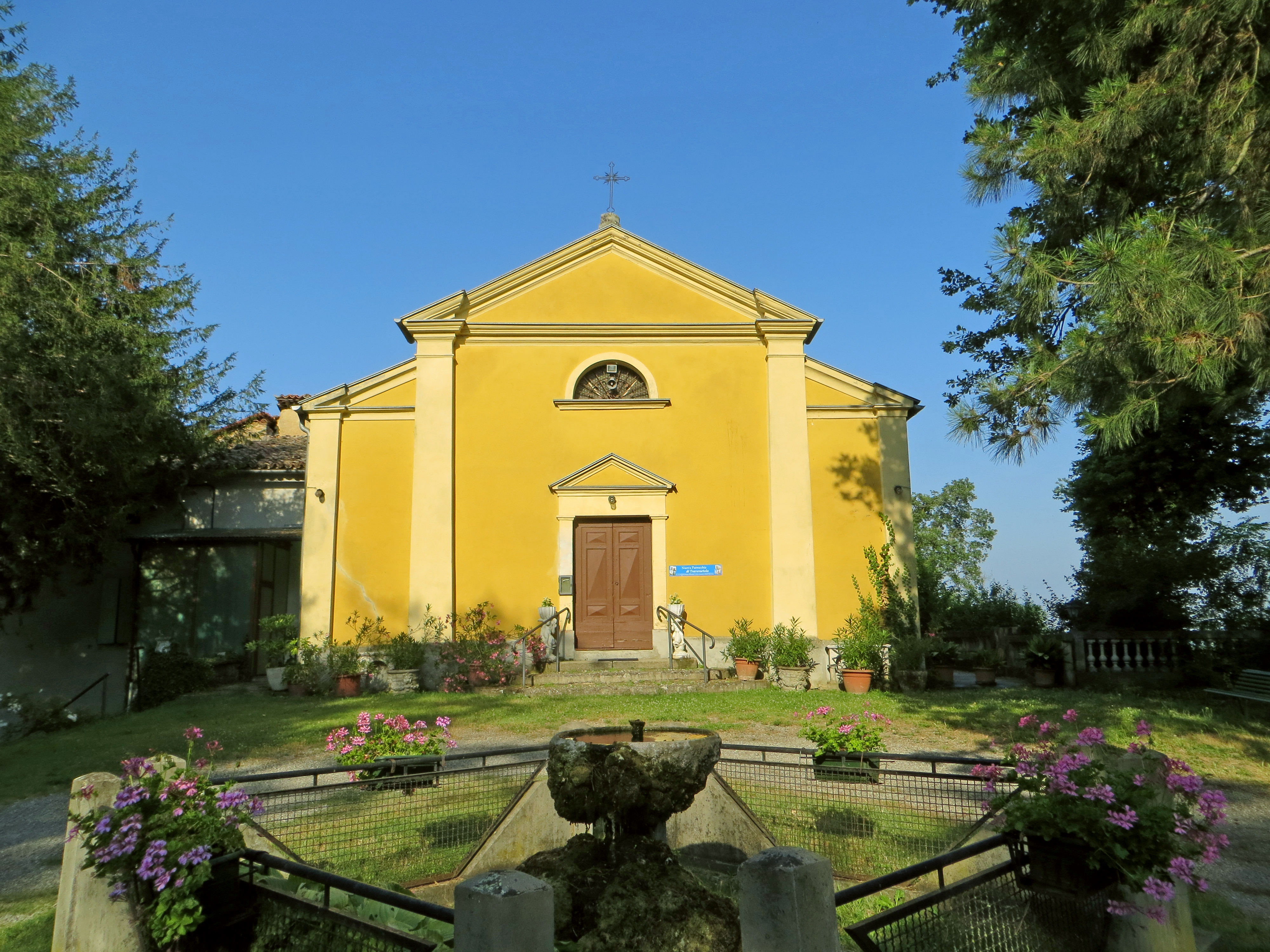 Chiesa di San Nicolò (Cazzola, Traversetolo) - facciata